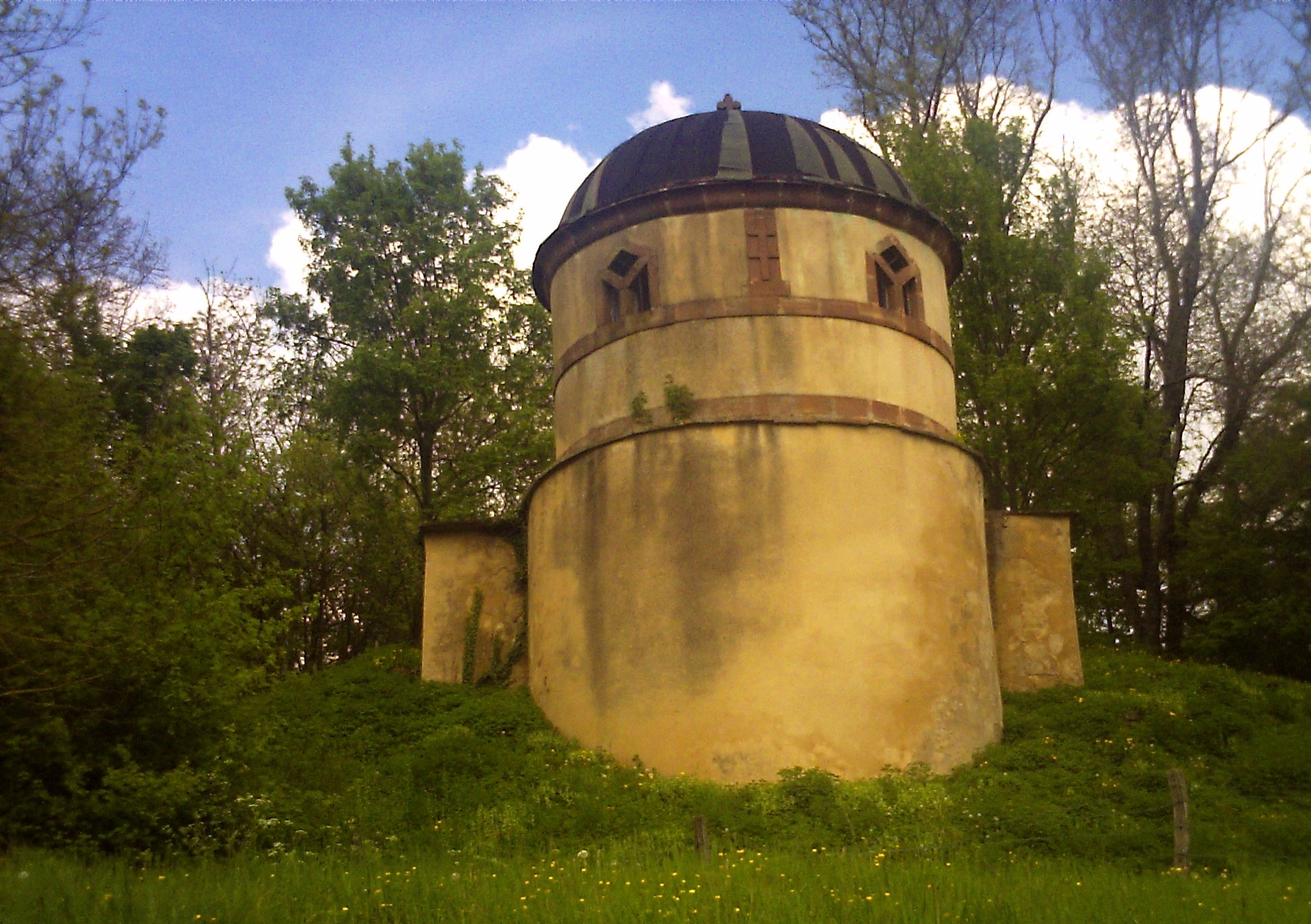 Chapelle de Marimont à Bourdonnay (57)